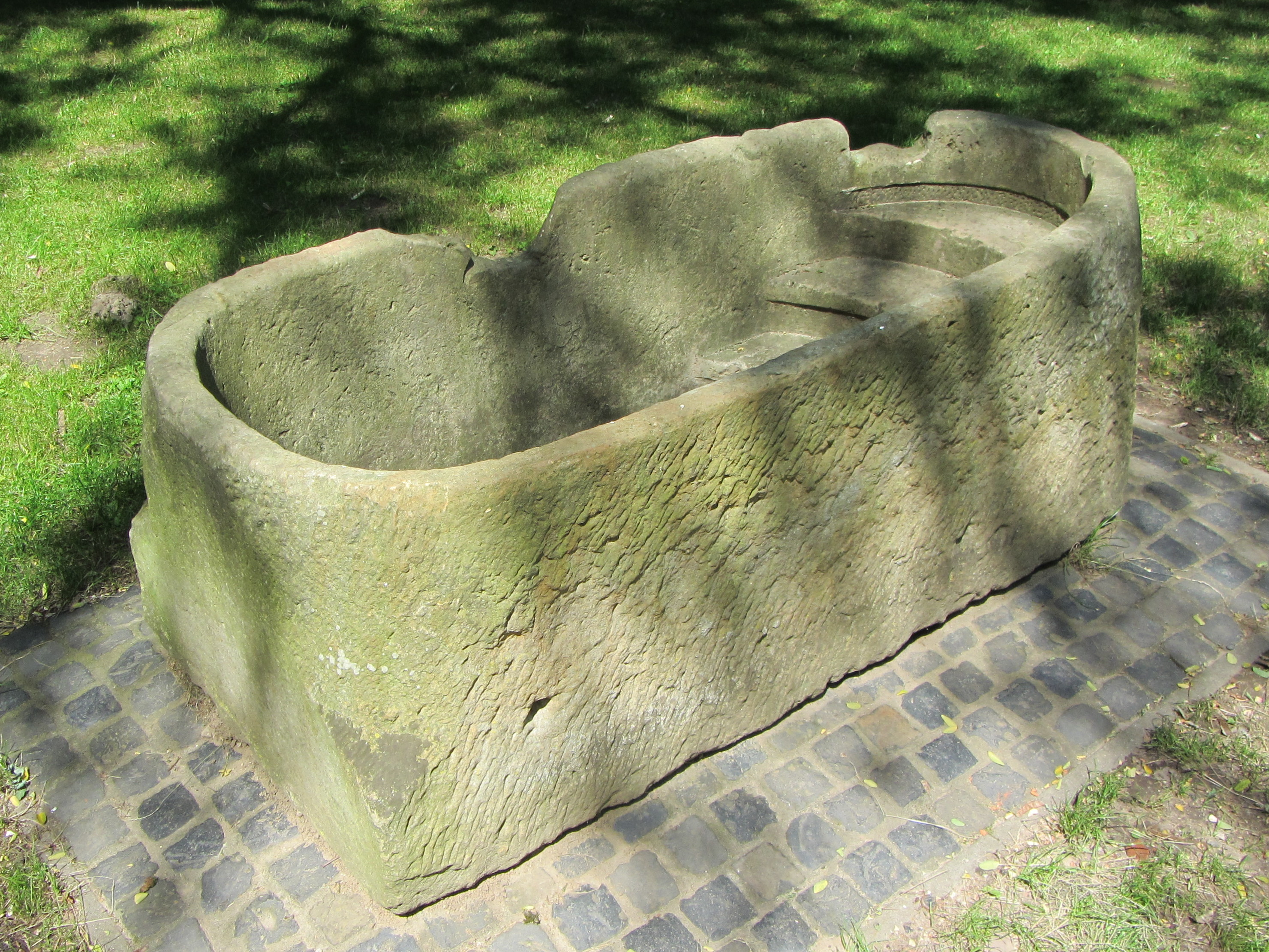 Badewanne aus 1813. Innenschrift der Tafel: "Badewanne 1813 Aus dem eröffneten Sol,- Moor und Schwefelbad Je sieben Badewannen befanden sich in zwei durch einen Säulengang miteinander verbundenen Badepavillion mit achteckigem Grundriss. Baudenkmal"